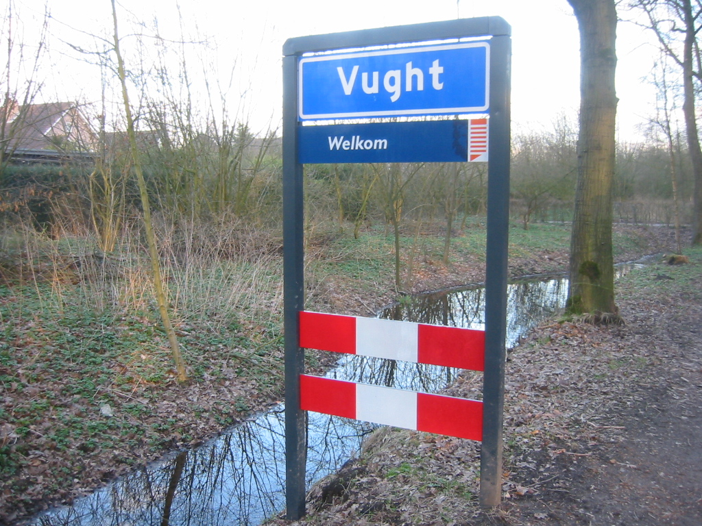 Gemeentebord gemeente Vught, zelfgemaakte foto